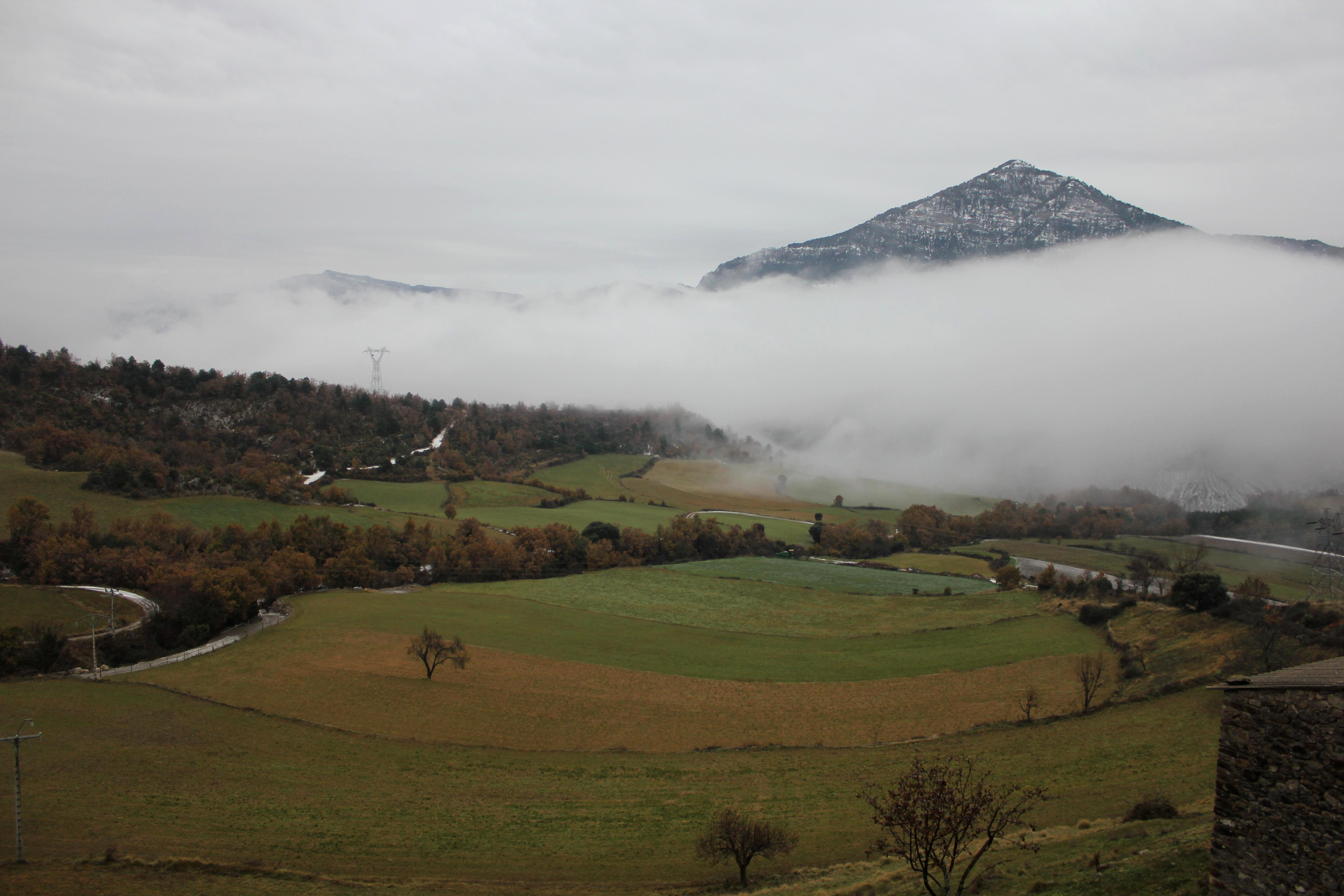 Aragonés: O puerto d'A Foradada dende Foradada d'o Toscar.